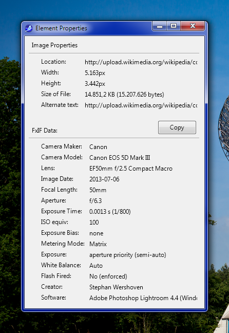 Anzeige der Metadaten (binäre EXIF-Daten, IPTC-NAA-Daten und XMP) eines JPEG-Fotos in Mozilla SeaMonkey mit Hilfe von FxIF (ein Tool, das enthaltene Metainformationen in Firefox oder SeaMonkey oder anderen kompatiblen Browsern anzeigen lässt)